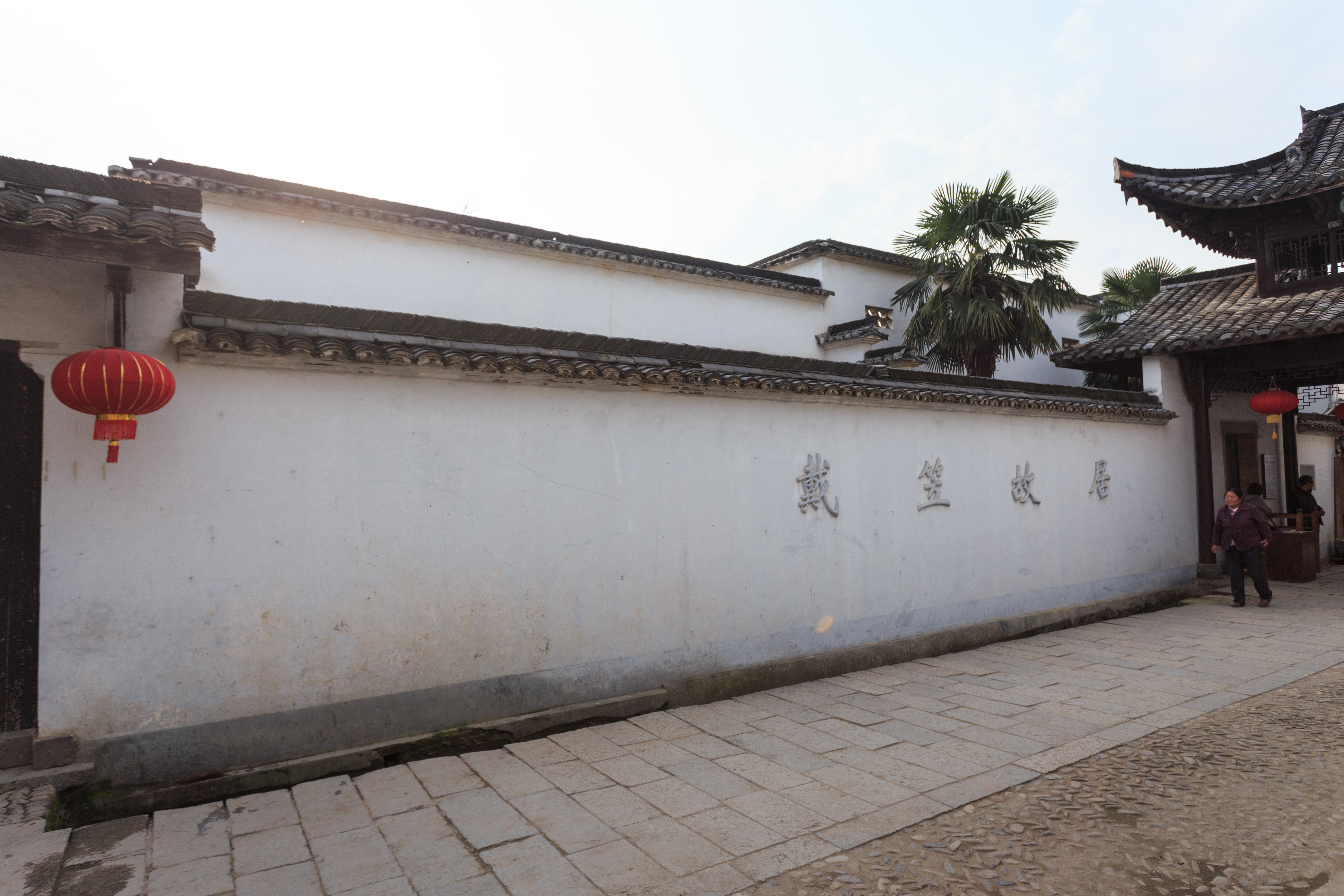 浙江江山保安戴笠故居